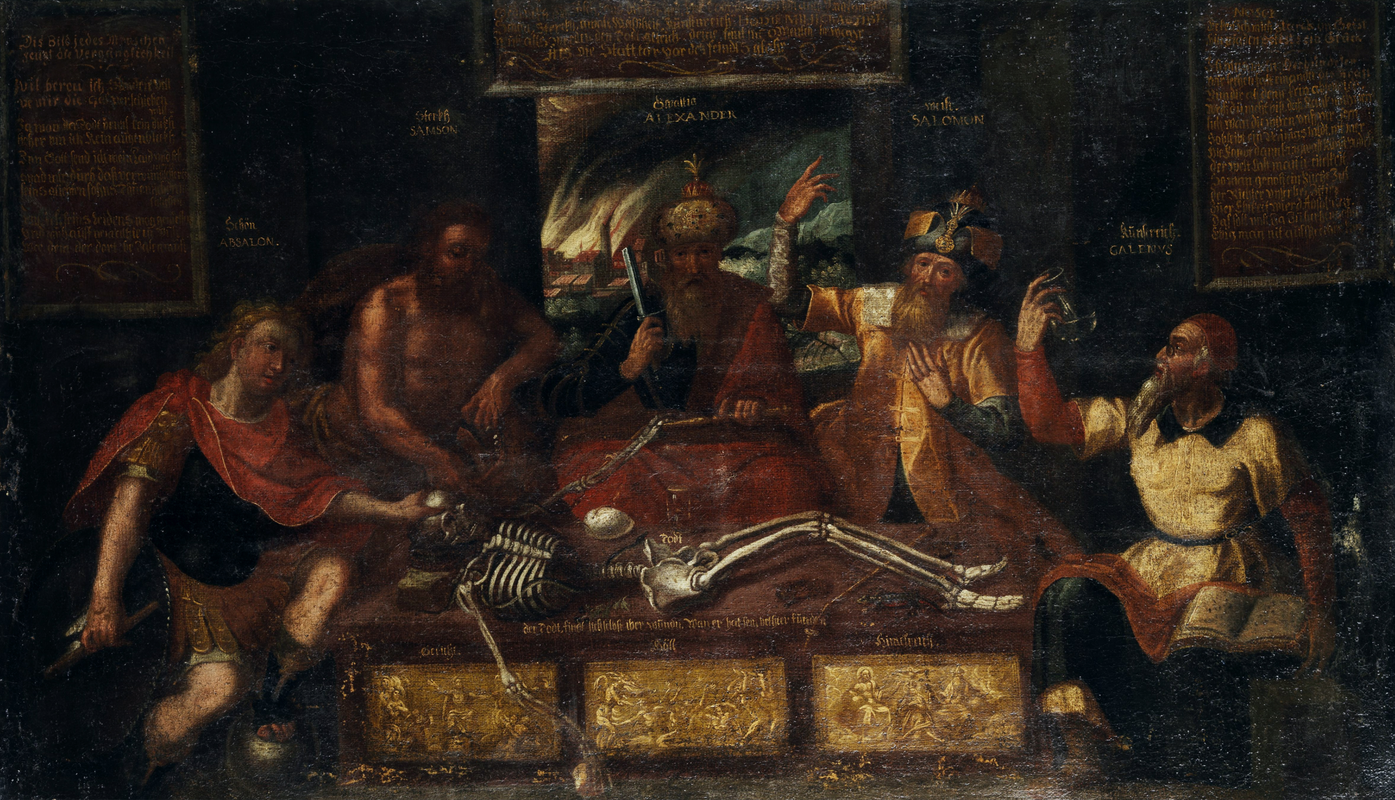 Vanitas-Allegorie mit historisch/biblischen Gestalten (Alexander der Große, Absalon, Samson, Salomo, Galenus) und Skelett. Deutschland, 17. Jahrhundert. Öl auf Leinwand. 80 x 138,5 cm.